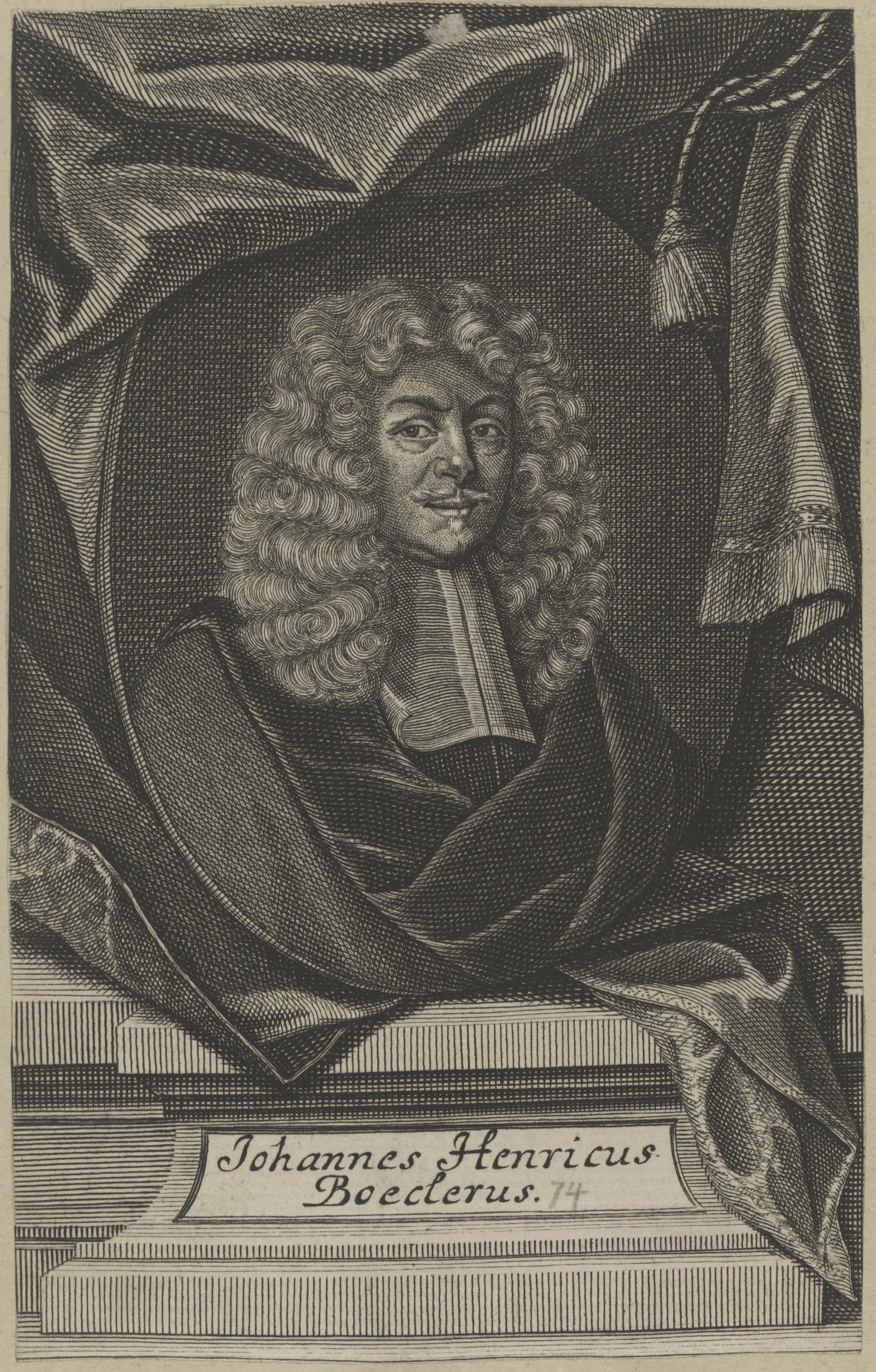 Johann Heinrich Boeckler. Berlin, Staatsbibliothek zu Berlin - Preußischer Kulturbesitz, Handschriftenabteilung, Hansen, Inventar-Nr. Portr. Slg / Slg Hansen / Philos., Dichter / Bd. 3 / Nr. 9